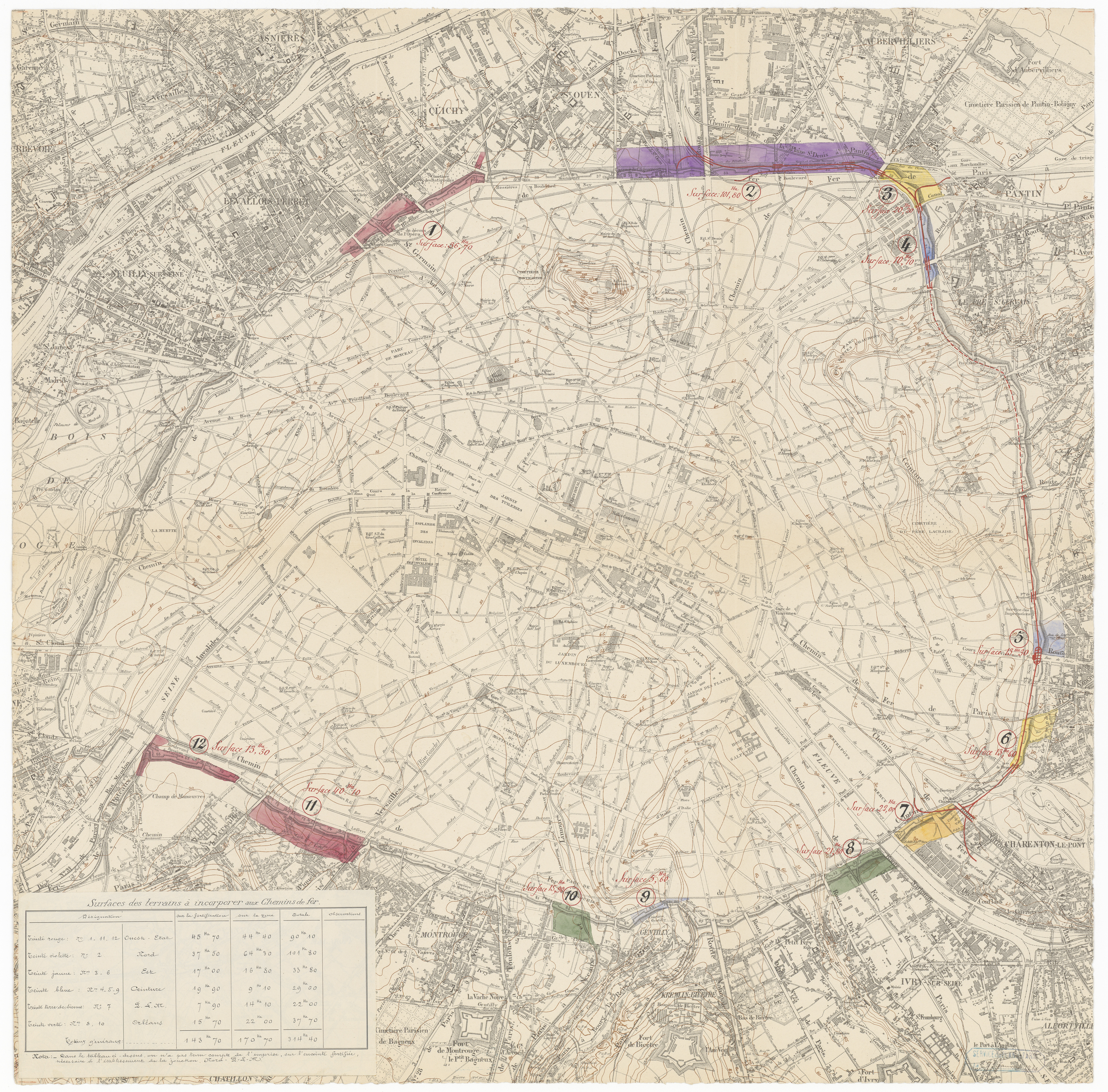 Plan d’ensemble au 1/20000 de Paris et de son enceinte en 1920